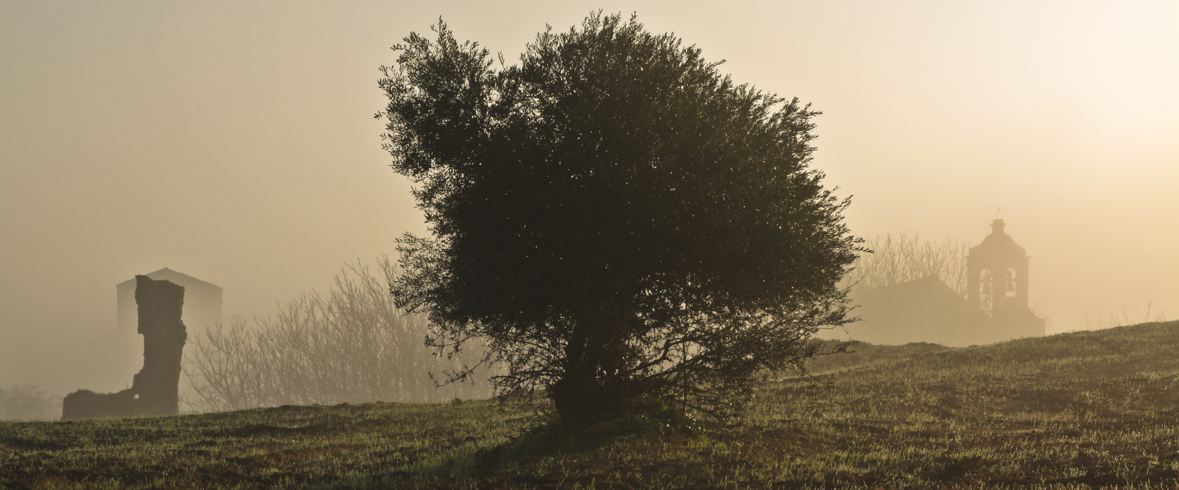 Ruinas de Gandul. A la derecha Iglesia de San Juan Evangelista. Al fondo a la izquierda silueta de la torre de Gandul. Provincia de Sevilla. España.